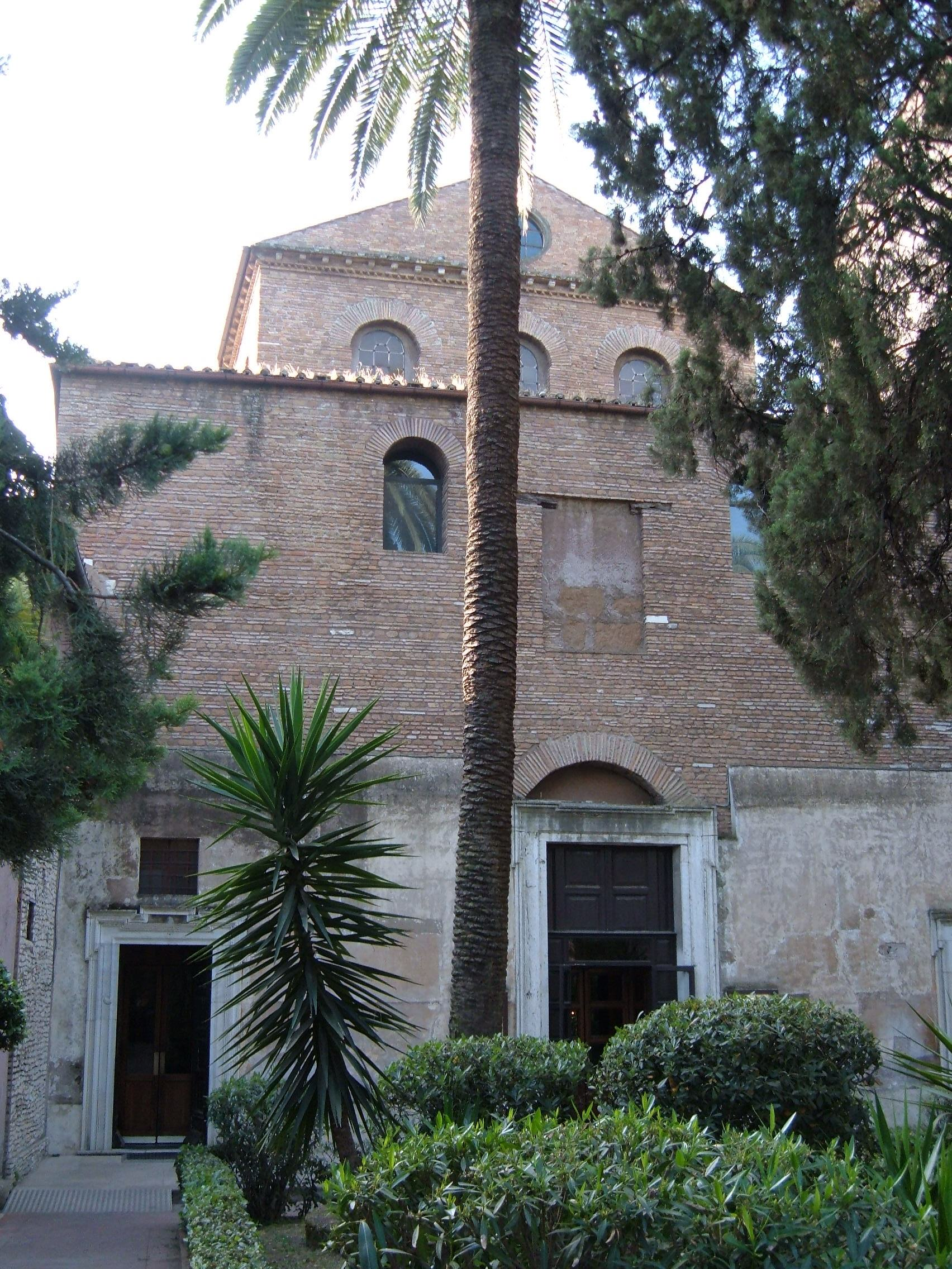 Basilica di Sant'Agnese fuori le Mura, a Roma, nel quartiere Trieste (Q. XVII). La facciata.